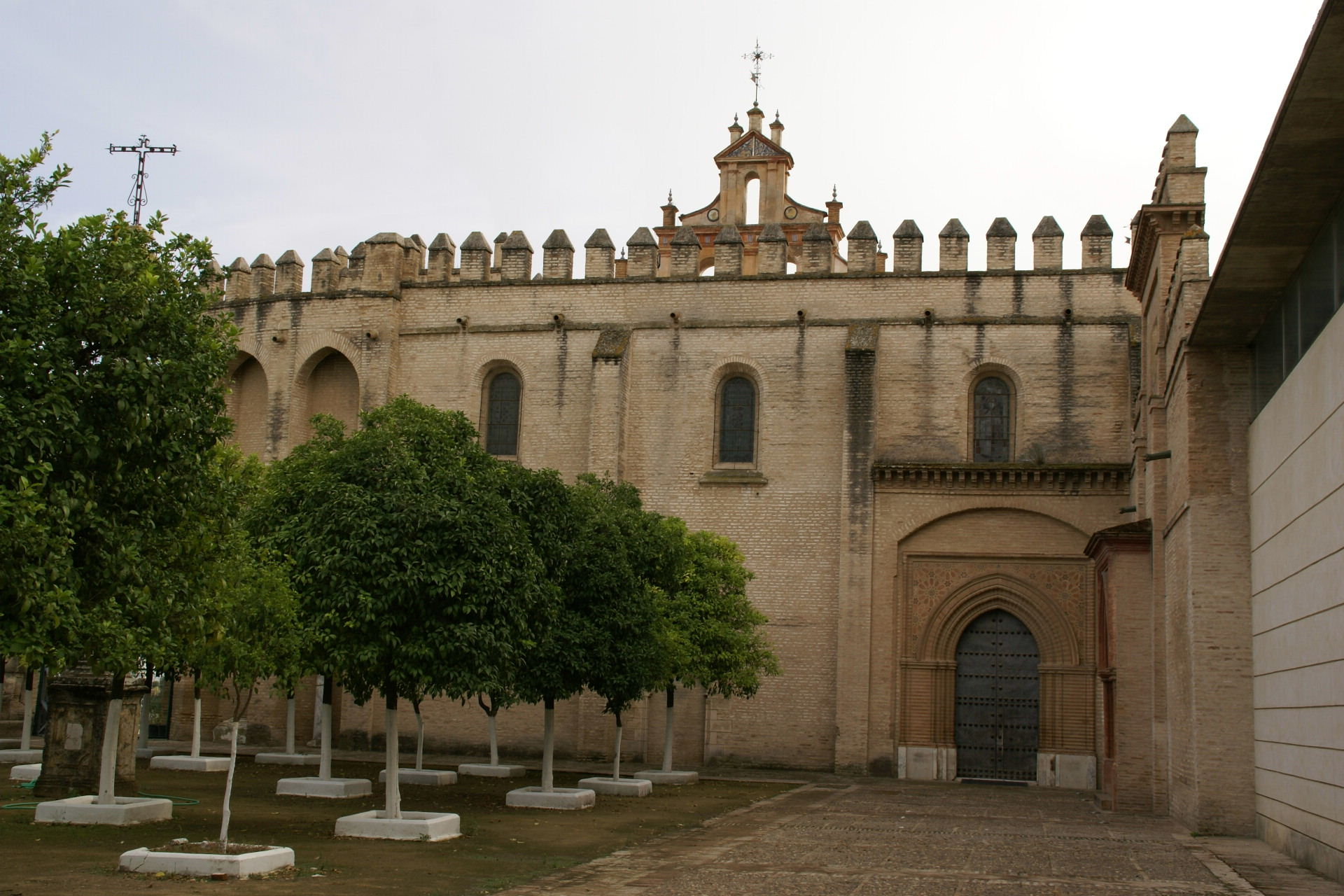 Monastery of San Isidoro del Campo, Santiponce (Seville) Spain